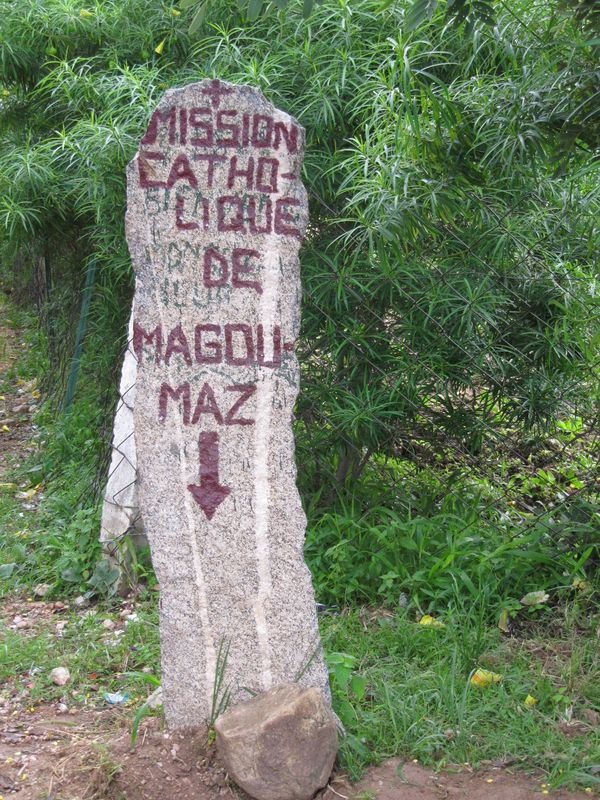 entrée du presbytère catholique de Magoumaz